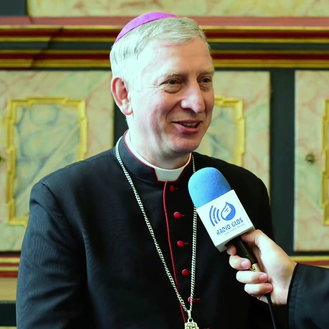 Radio Głos i dr Ryszard Kasyna, biskup pomocniczy gdański i biskup diecezjalny pelpliński.